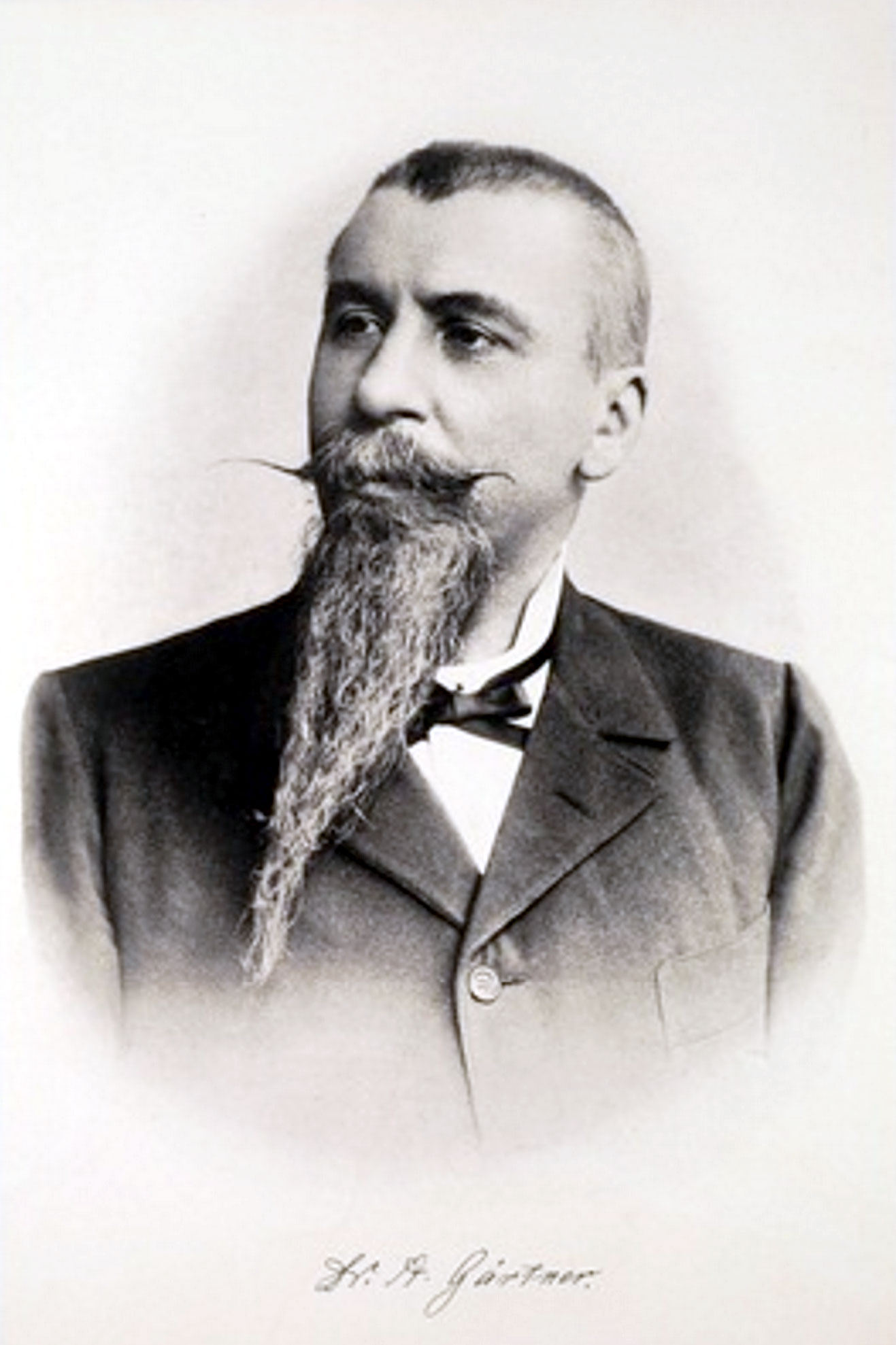 August Gärtner' (1848-1934) war ein deutscher Mediziner, Mikrobiologe und Hygieniker